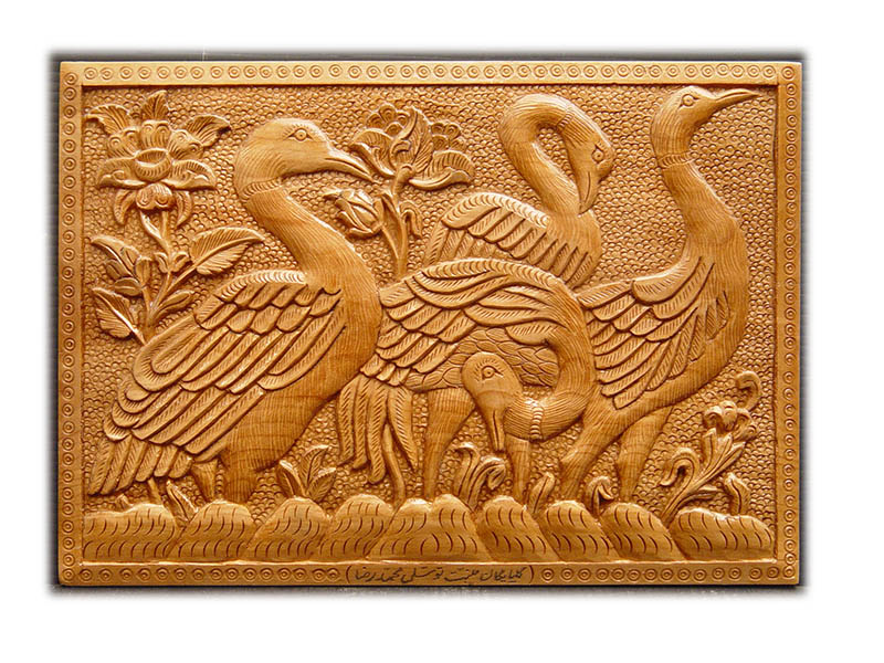 منبت کاری گلپایگان